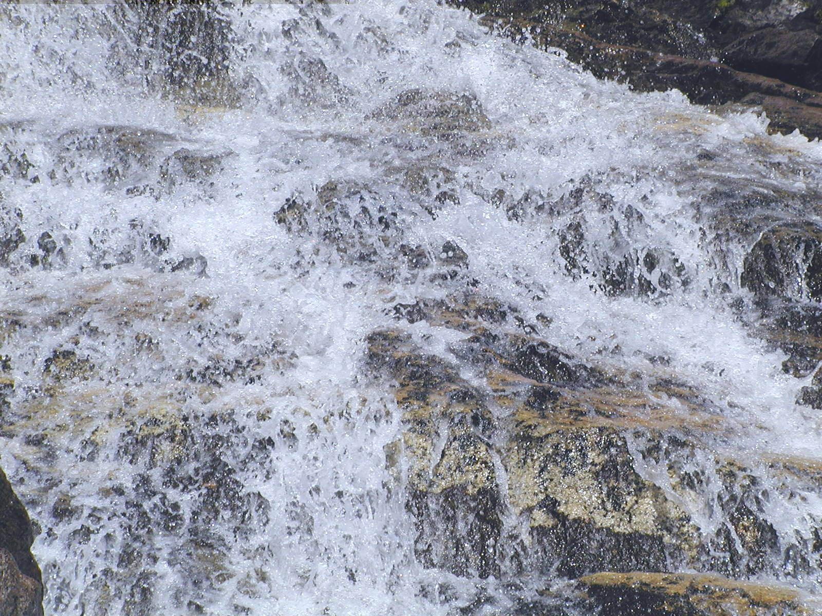 Ansicht eines Baches – Neves-Stausee, Südtirol, Italien